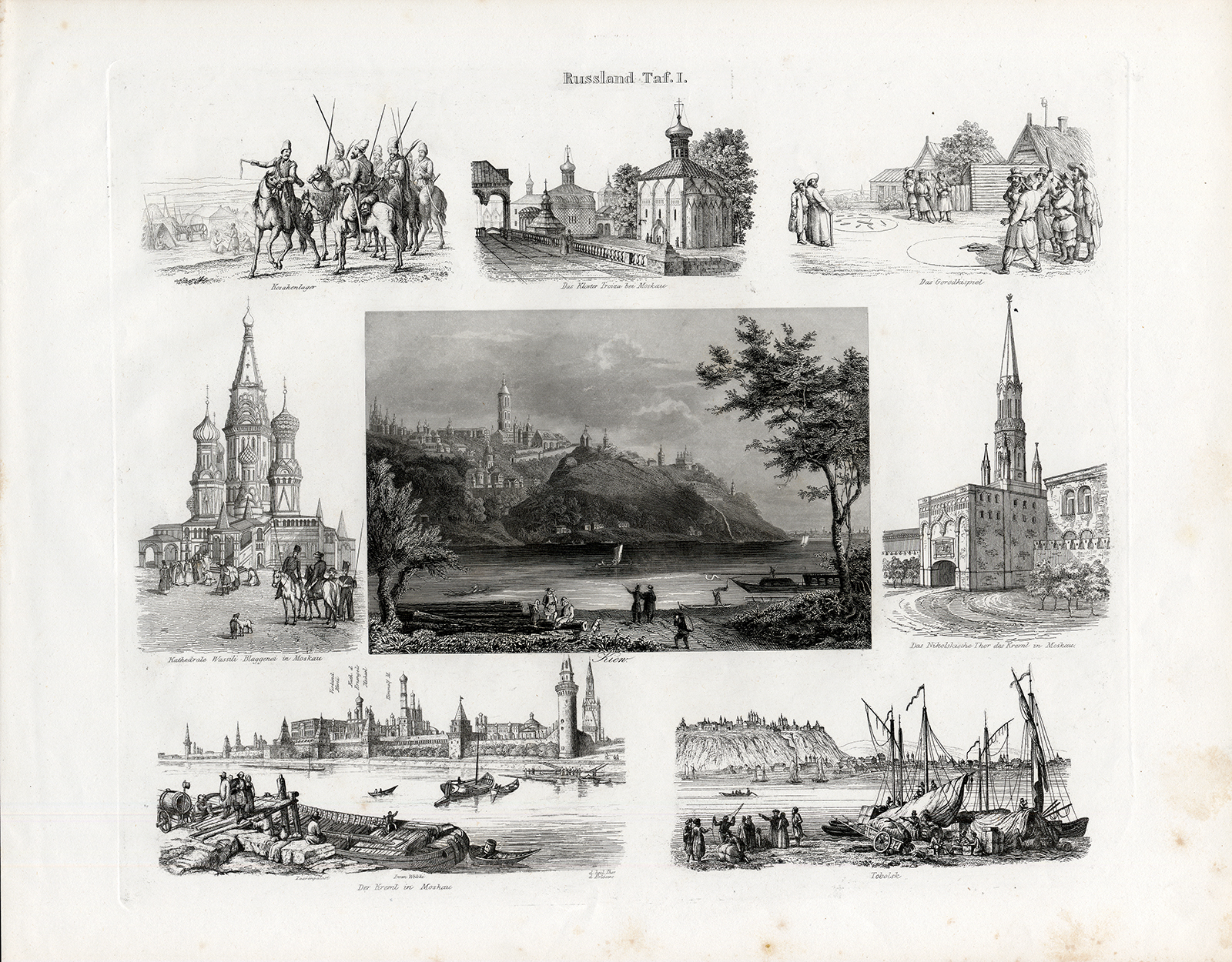 "Rusland Taf. 1: Kiew" (Russia 1: Kiev). It also shows a Cossack army, Troiza monastery, a game of Gorodki, Wassili Blaggenoi cathedral in Moskau, Tobolsk, St. Nicholas tower in the Kremlin and the Kremlin. This print originates from: 'Verldshistoriskt Album, innehallande Femhundra Teckningar ofver Jordens skilde Lander och Folk' (Stockholm, 1857). No author for this work is given.